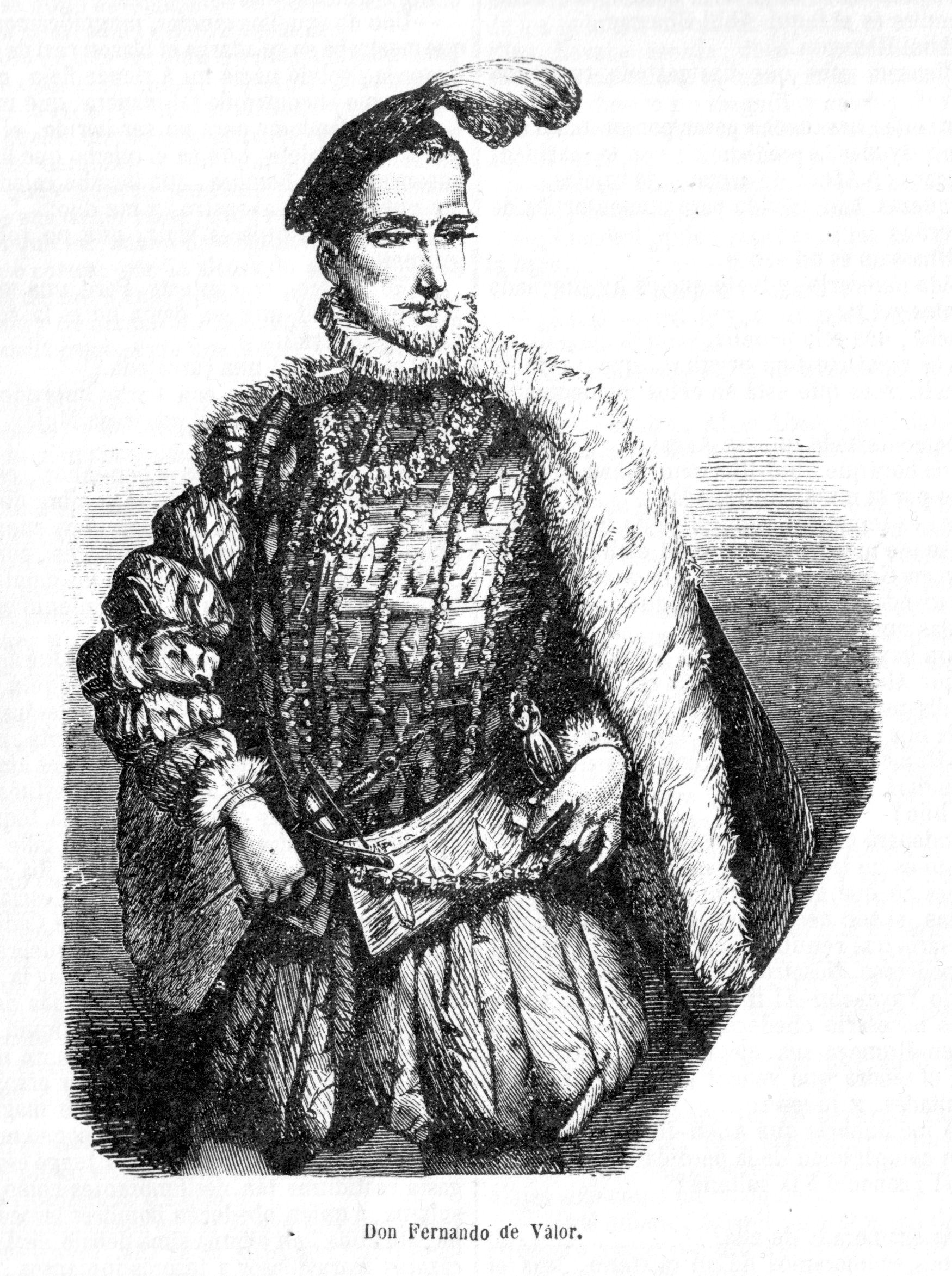 Don Fernando de Valor